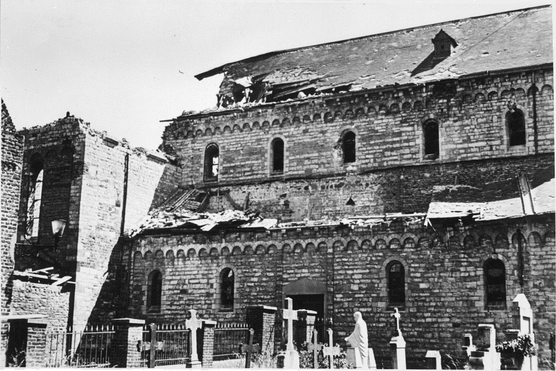 Rooms-Katholieke Kerk: oologsschade, reproductie van foto